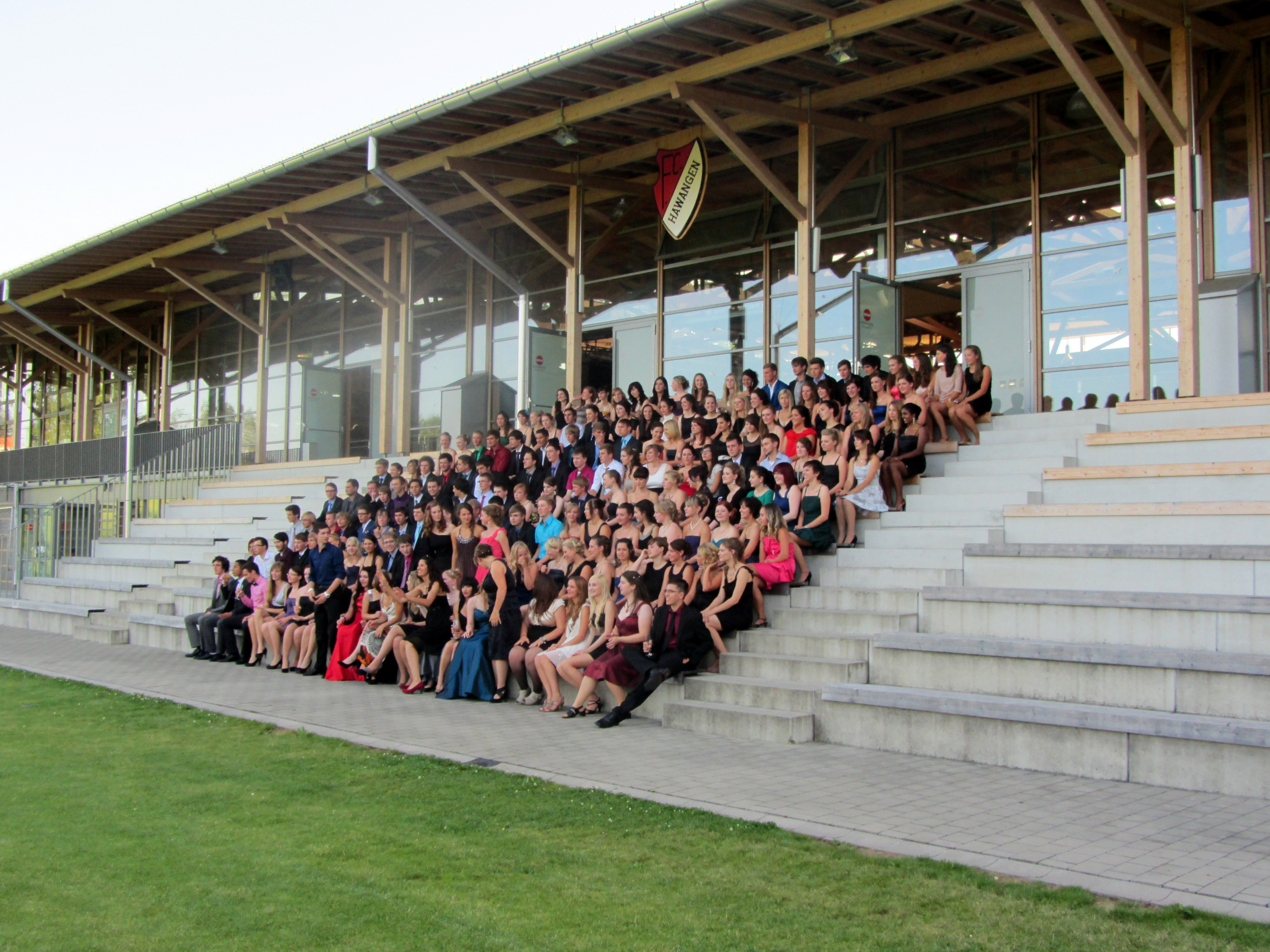 Abiball Gymnasium Ochsenhausen im Jahre 2012 (Schüler des G8 und G9)